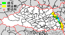 北葛飾郡の範囲（明治初期の状態を濃色、編入部を薄色、旧鷲宮町を水色で表示）